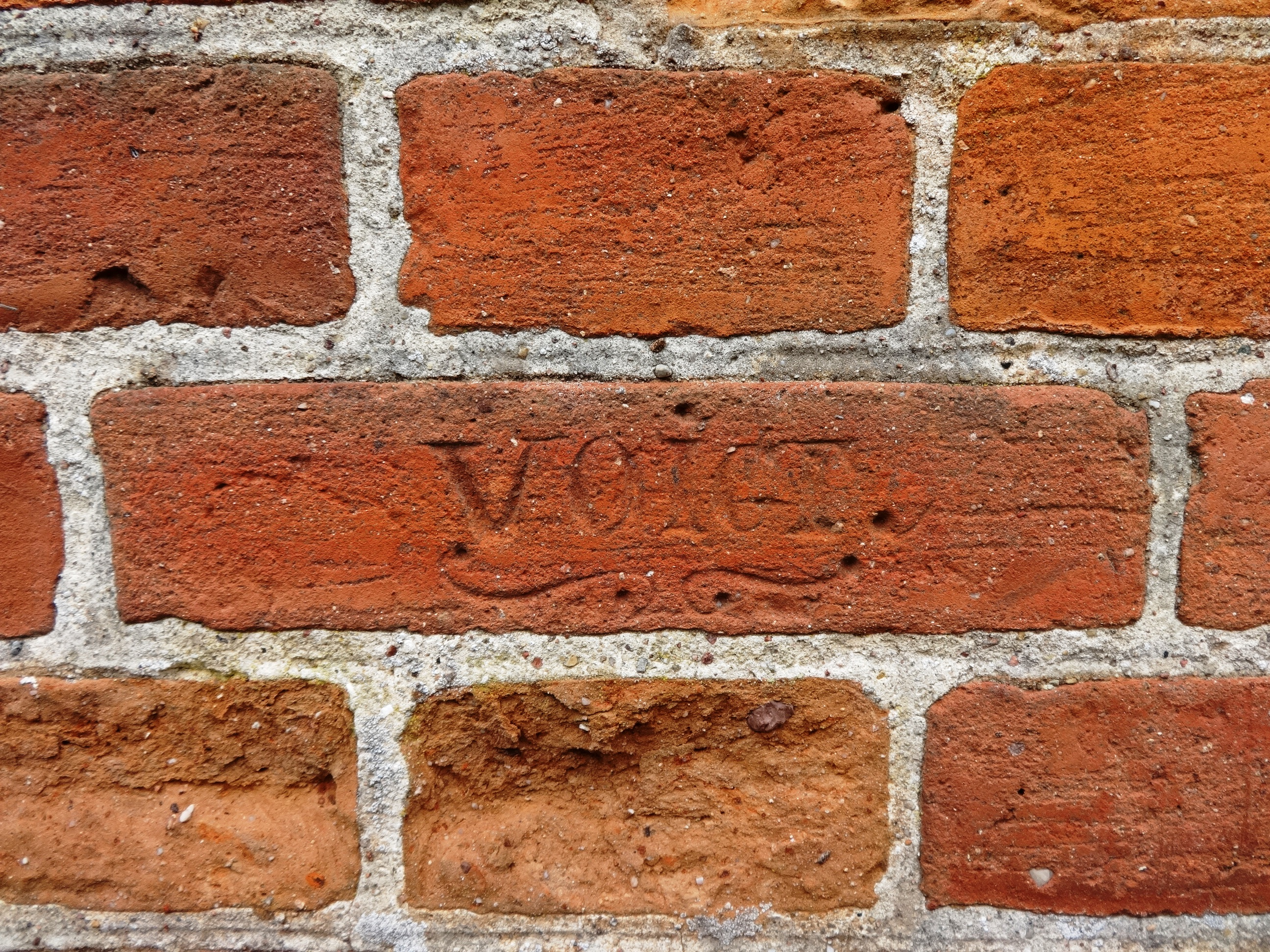 Kapelle in Alt Pansow, Ortsteil von Dersekow in Mecklenburg-Vorpommern